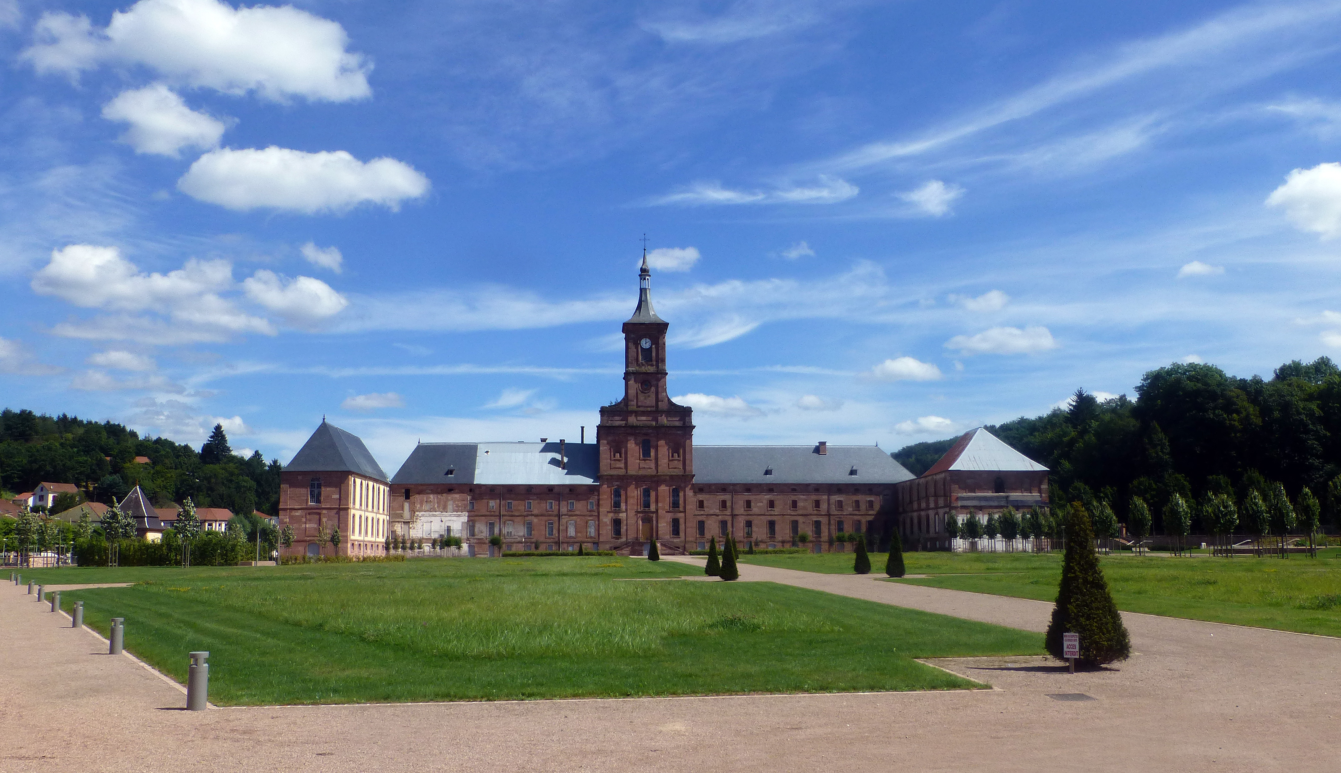 Abbaye de Moyenmoutier (Vosges) : aménagement des espaces verts en août 2016.